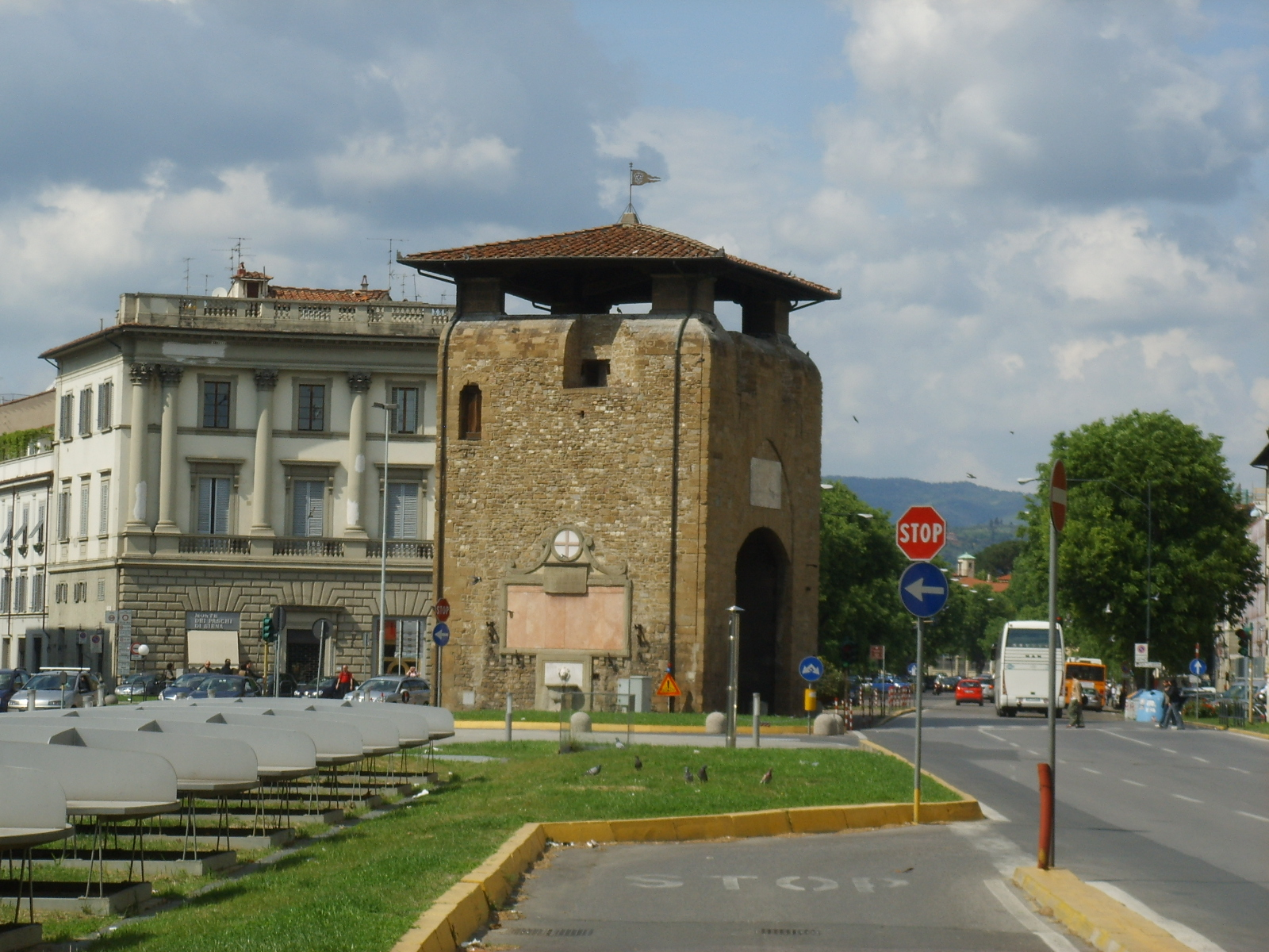 Porta alla croce lato